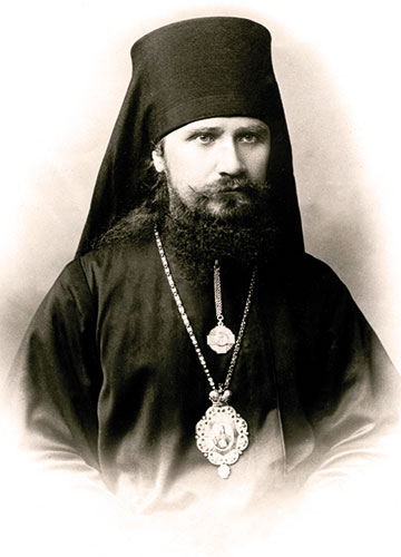 Священномученик Никодим (Кротков; 1868-1938). Фото 1908 года.